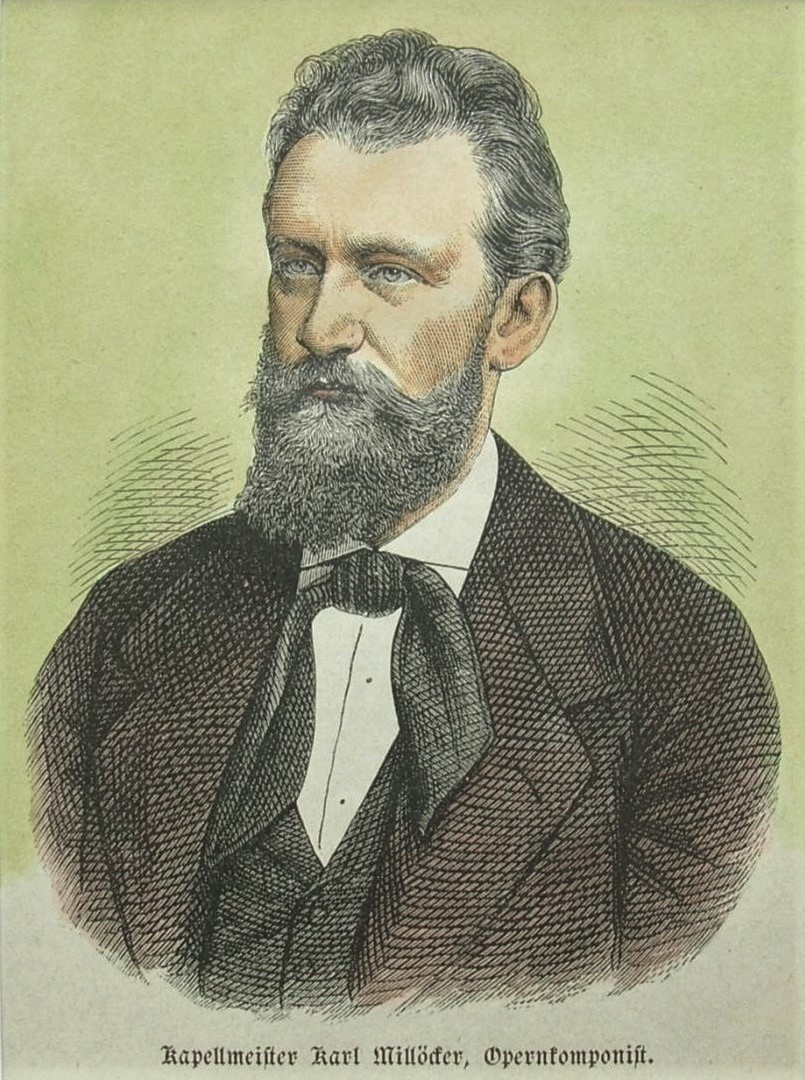 Karl Millöcker, Kapellmeister und Opernkomponist 1883, teilkolorierter Holzstich, ca. 12 x 10 cm